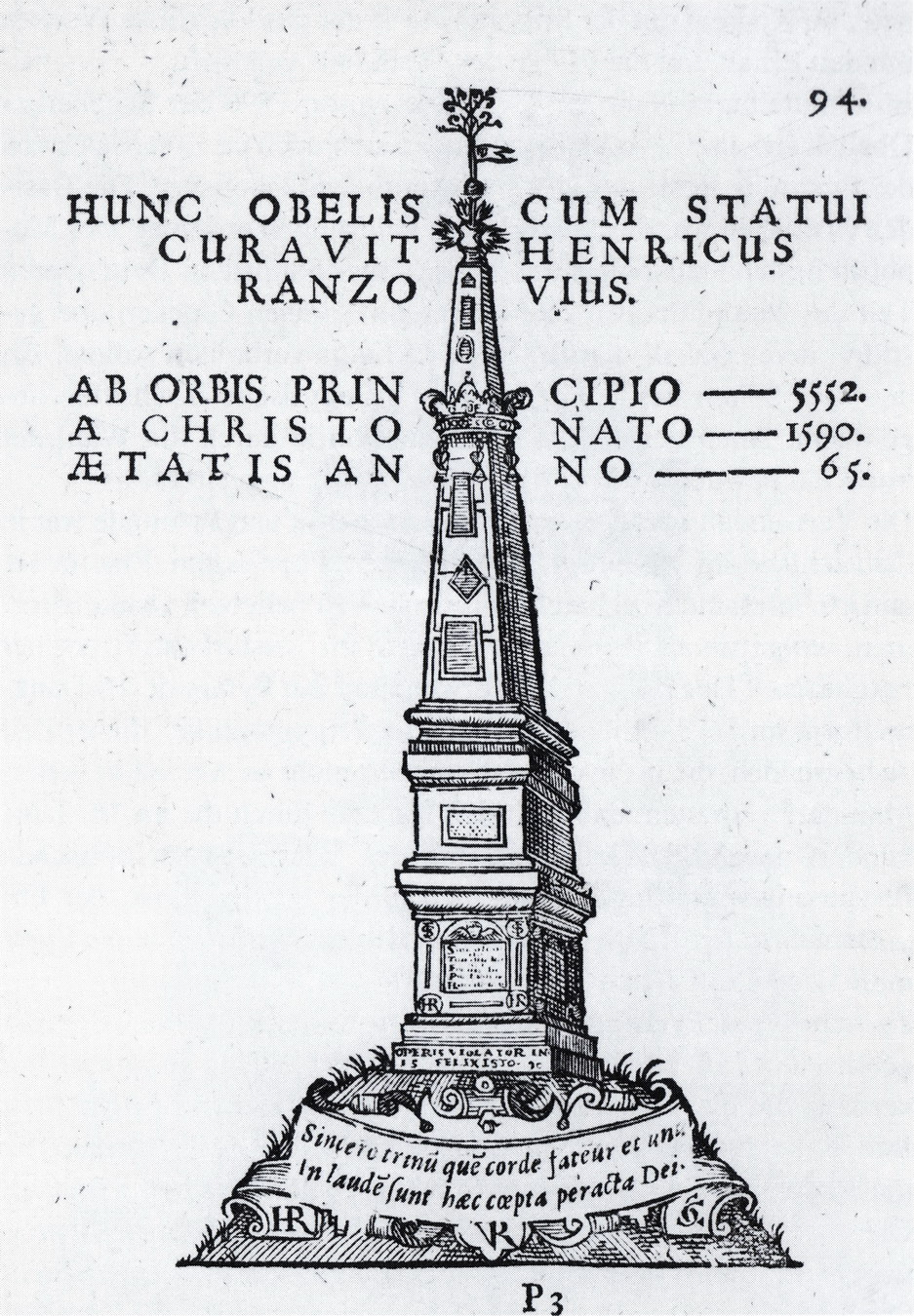 Der Segeberger Obelisk (errichtet unter Heinrich Rantzau) in den Commentarii rerum memorabilium in Europa gestarum, Darstellung (1593) von Peter Lindenberg